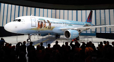 L'Airbus A320-200 OO-SNE in livrea Brueghel.